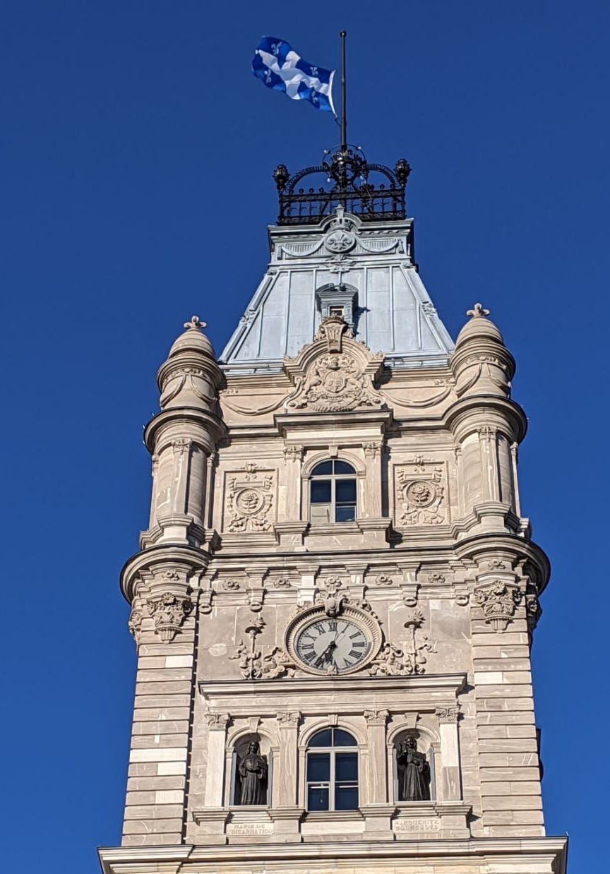 Le 13 mai 2020 a lieu la reprise des travaux à l'Assemblée nationale du Québec. Le drapeau du Québec est en berne de l'aube au crépuscule en mémoire aux victimes de la pandémie de Covid-19.